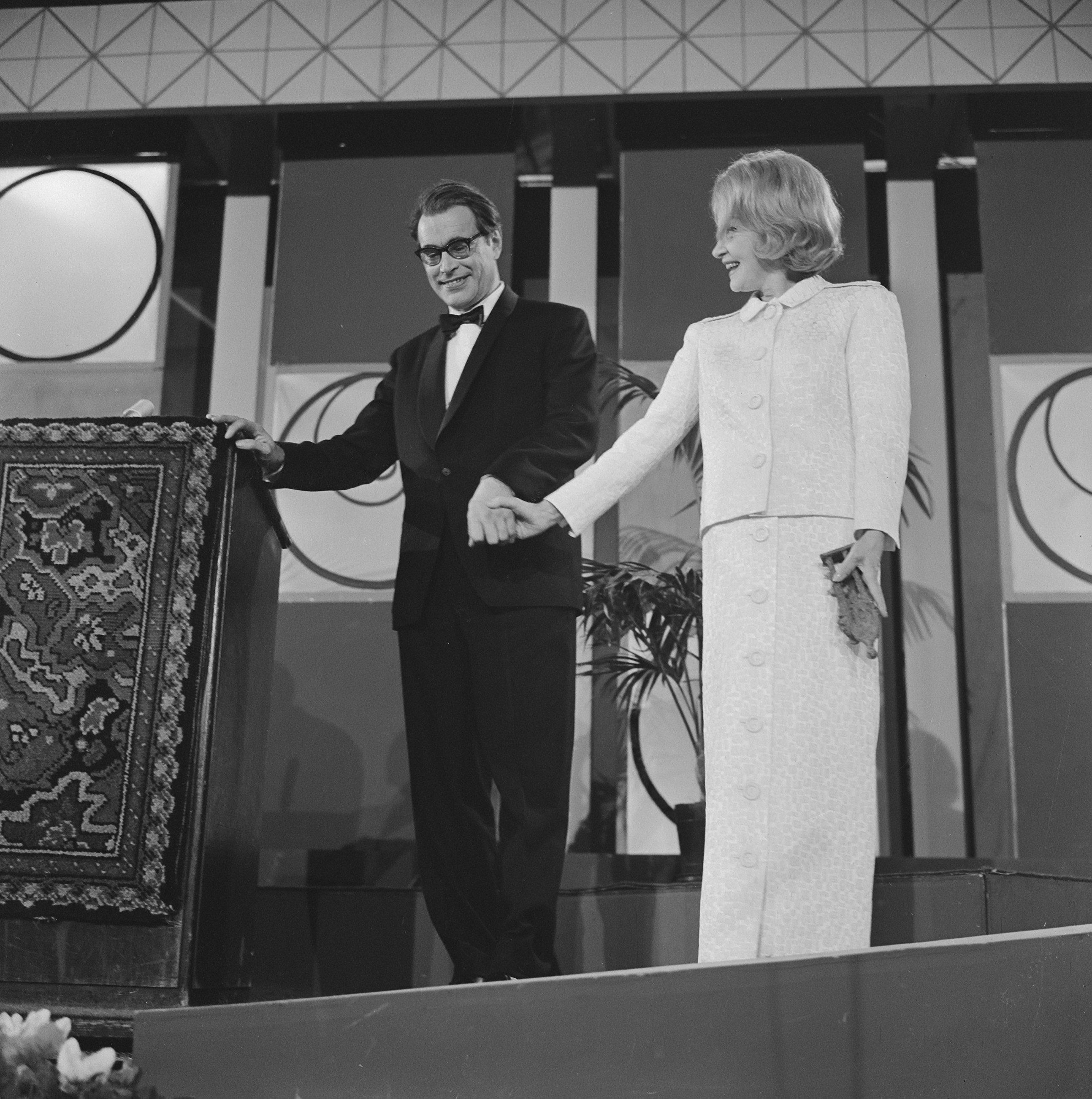 Collectie / Archief : Fotocollectie Anefo Reportage / Serie : [ onbekend ] Beschrijving : Grand Gala du Disque populier in Kurhaus te Scheveningen Bomans en Marlene Dietrich Datum : 12 oktober 1963 Locatie : Scheveningen, Zuid-Holland Persoonsnaam : Bomans, Dietrich, Marlene Fotograaf : Koch, Eric / Anefo Auteursrechthebbende : Nationaal Archief Materiaalsoort : Negatief (zwart/wit) Nummer archiefinventaris : bekijk toegang 2.24.01.03 Bestanddeelnummer : 915-6287 Reacties Geplaatst door Maaike op 02 oktober 2013 - 04:14. Persoonsnamen / Instellingsnamen: Grand Gala du Disque Populaire Persoonsnamen: Godfried Bomans